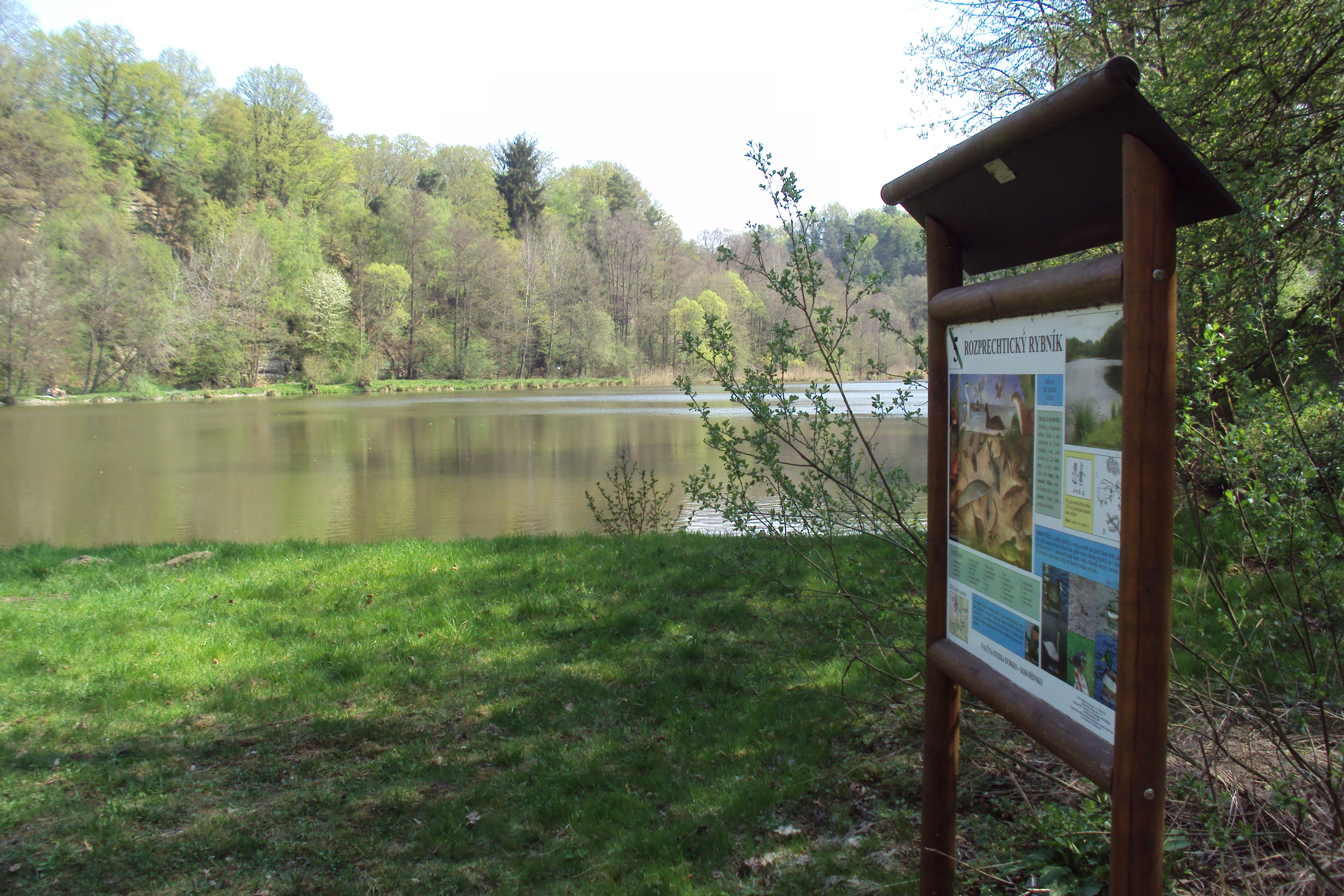 Rozprechtický rybník na trase naučné stezky z Dubé, katastr Rozprechtice